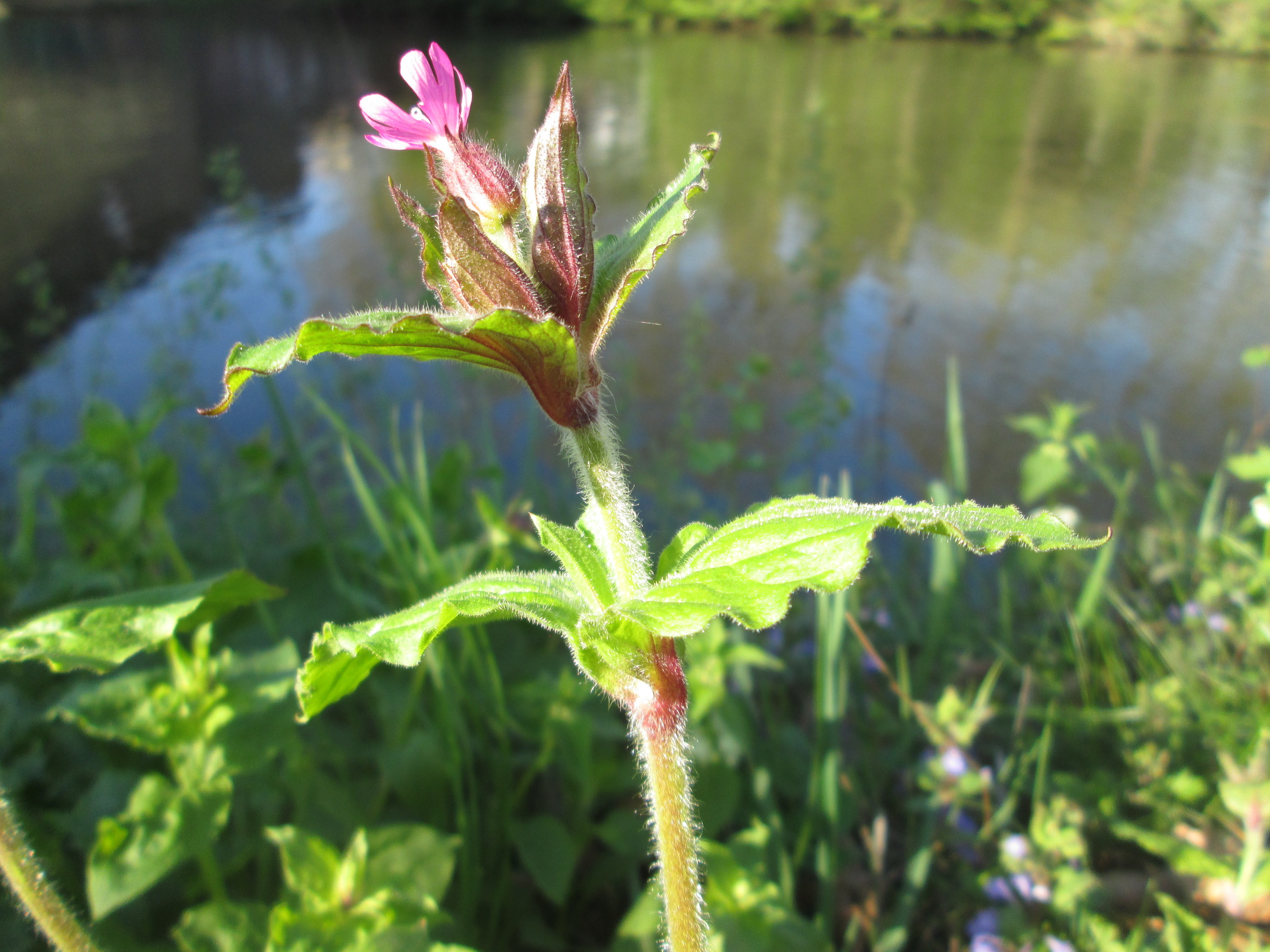 Rote Lichtnelke (Silene dioica) an der Saar in Sankt Arnual